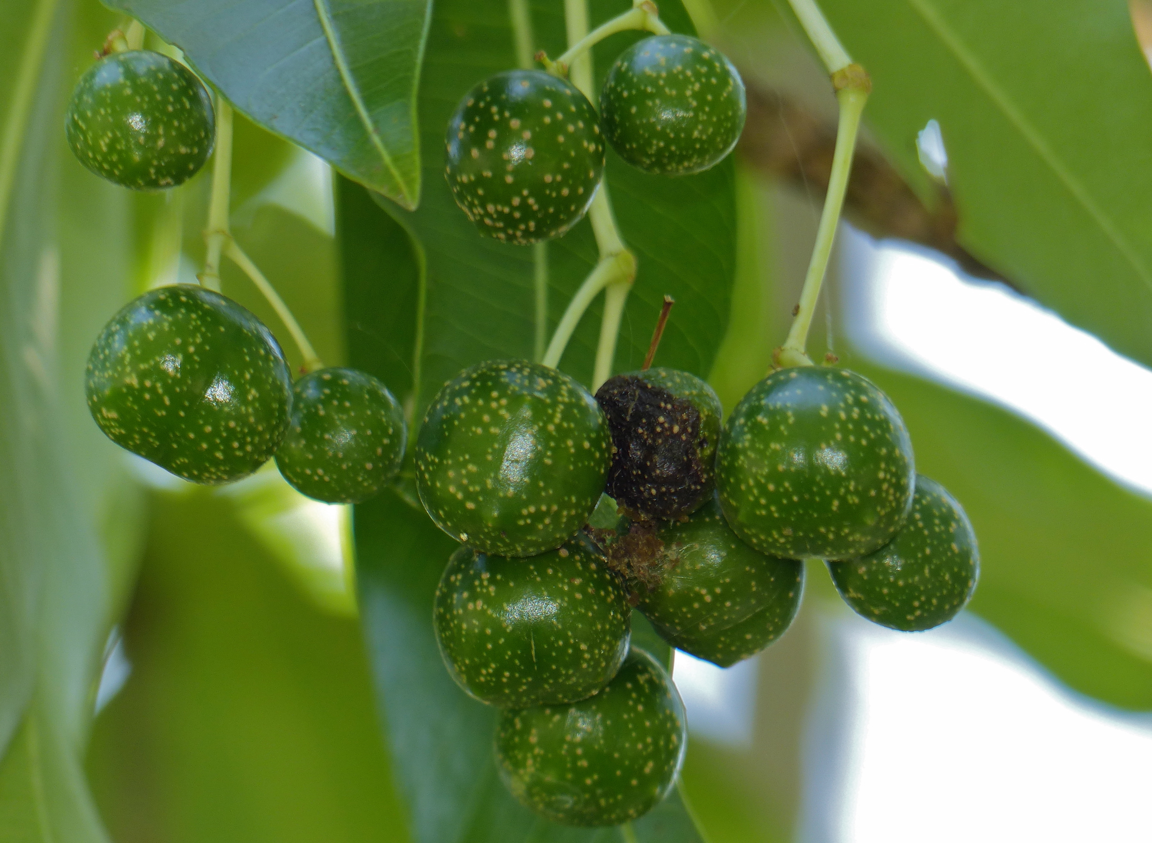 Skukuza Nursery, Kruger NP, SOUTH AFRICA